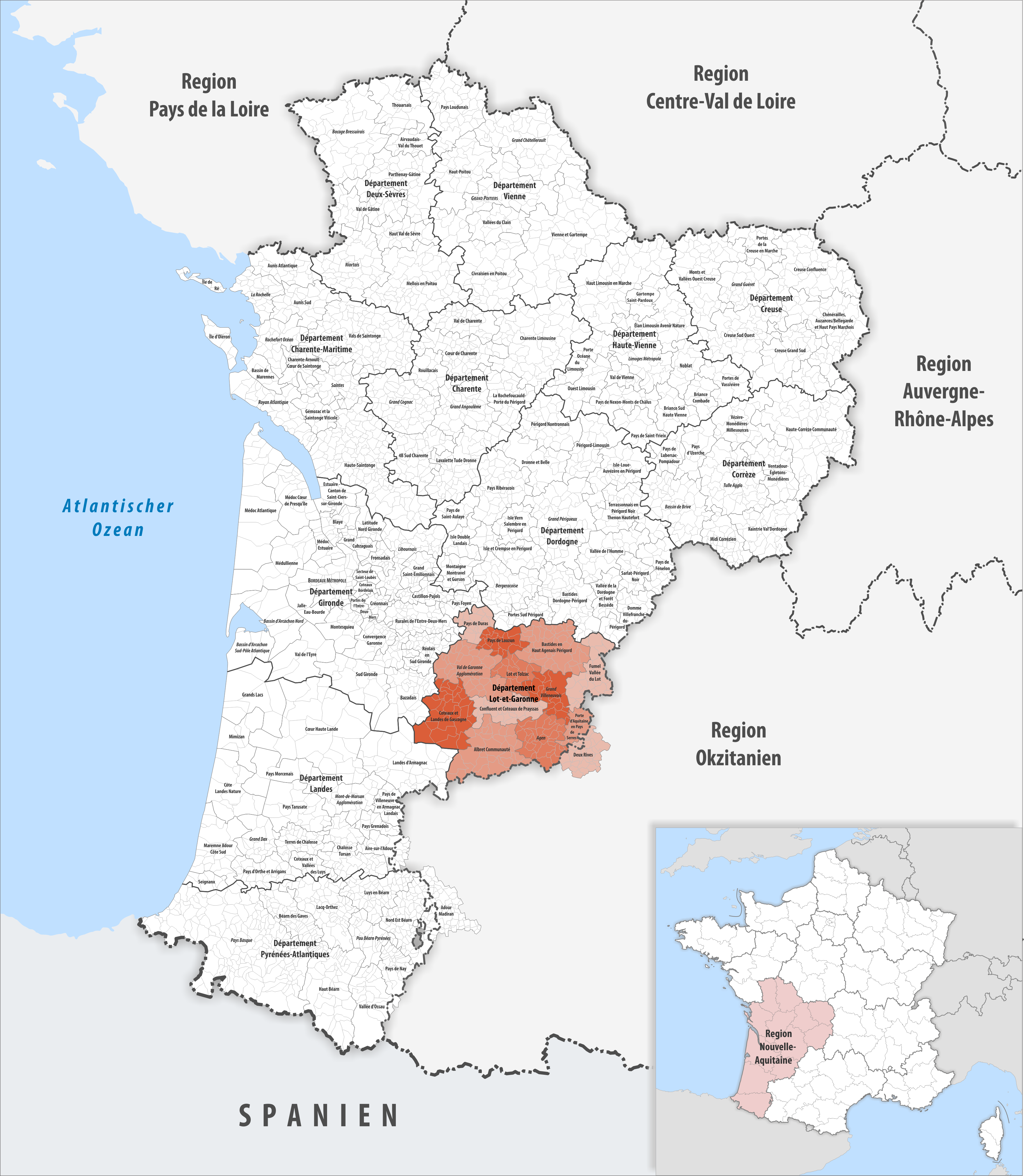 Gemeindeverbände im Département Lot-et-Garonne